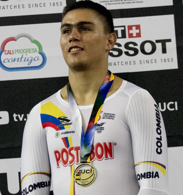 Fabián Puerta Campeón Keirin - Copa Mundo de Pista 2017 de Cali